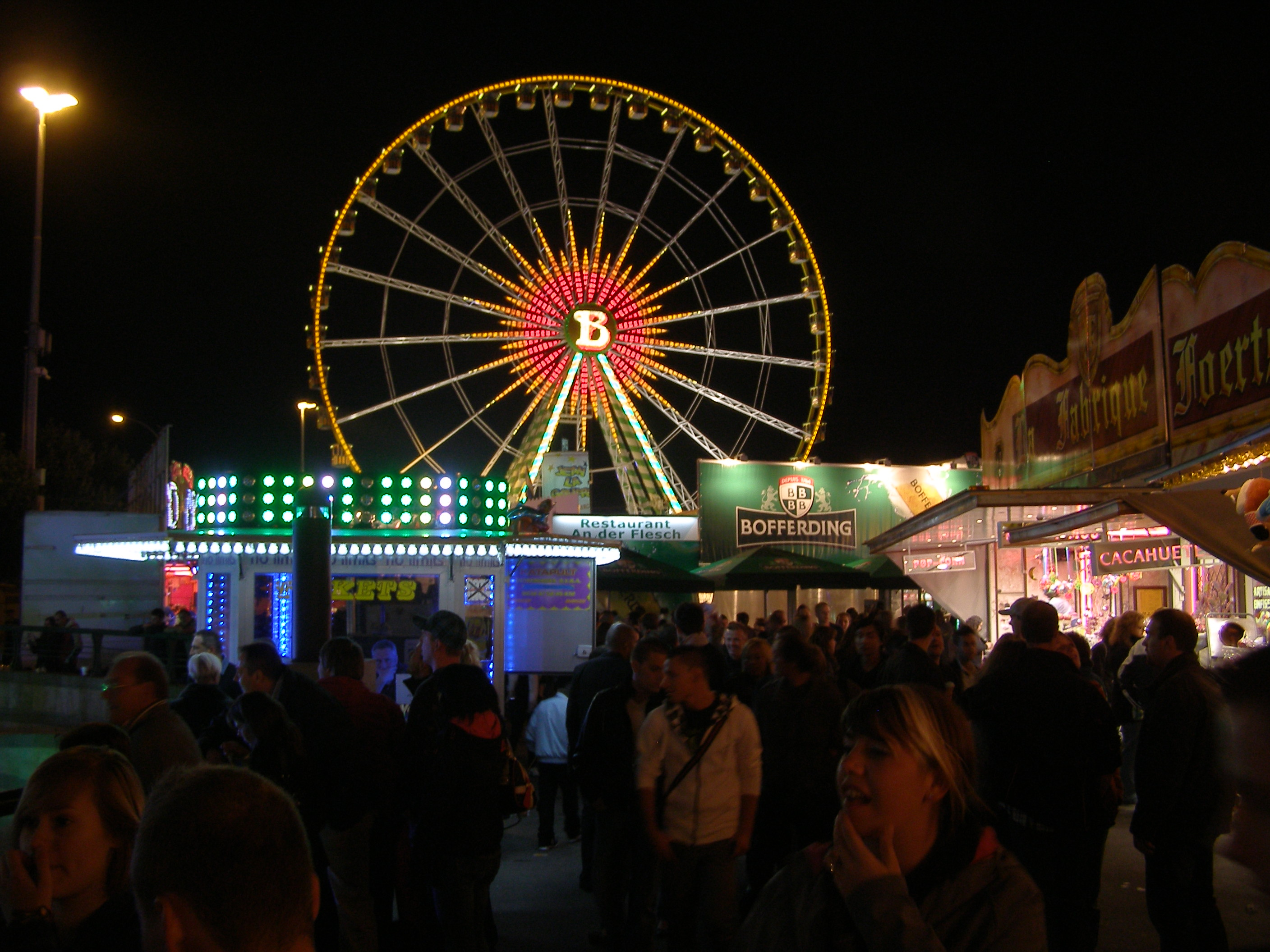 Die Schueberfouer/Schobermesse in Luxemburg bei nacht